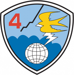 Gambar ini adalah Lambang Skuadron Udara 4, Koops AU II